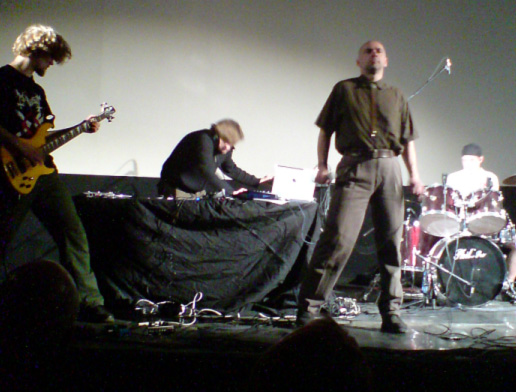 Allerseelen и Sal Solaris на выступлении в Нижнем Новгороде.